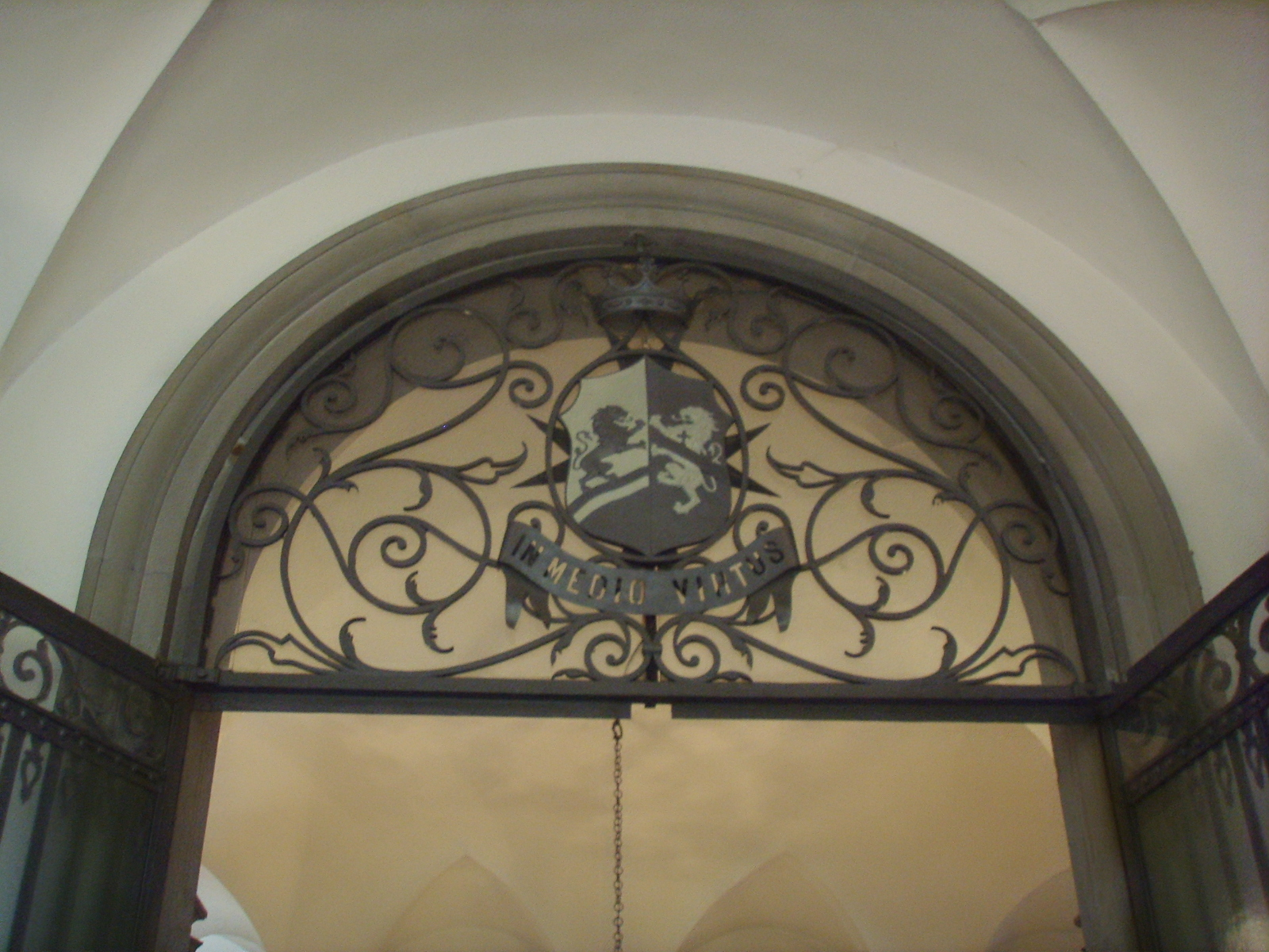 see fileneme